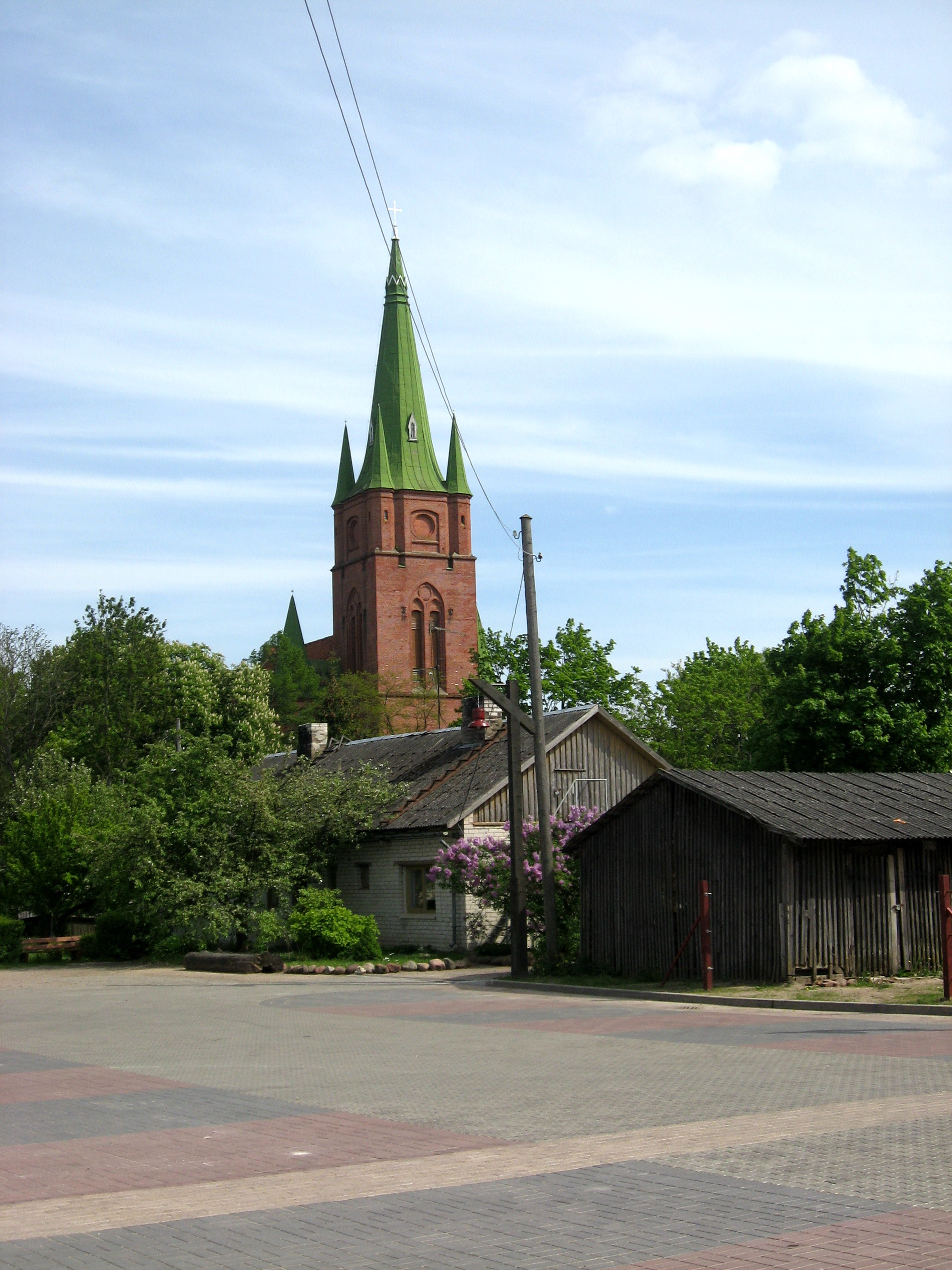 Kuldīga, luteránský kostel svaté Anny